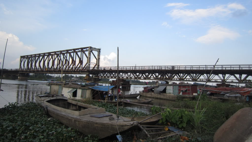 Cầu Ninh Bình qua sông Đáy trên tuyến đường sắt Bắc Nam